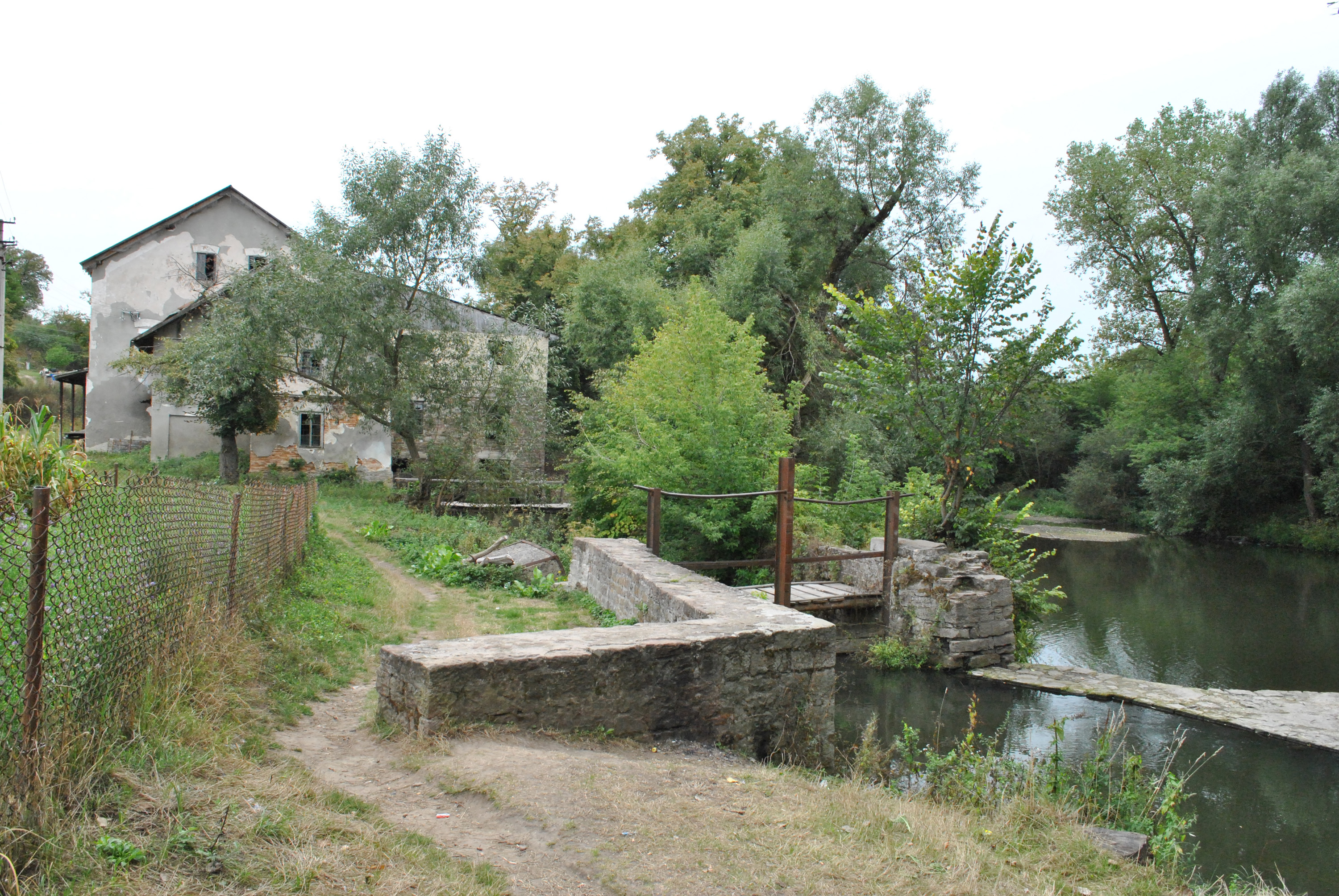 Млин (1911, мурований) у селі Струсів Теребовлянського району Тернопільської області.